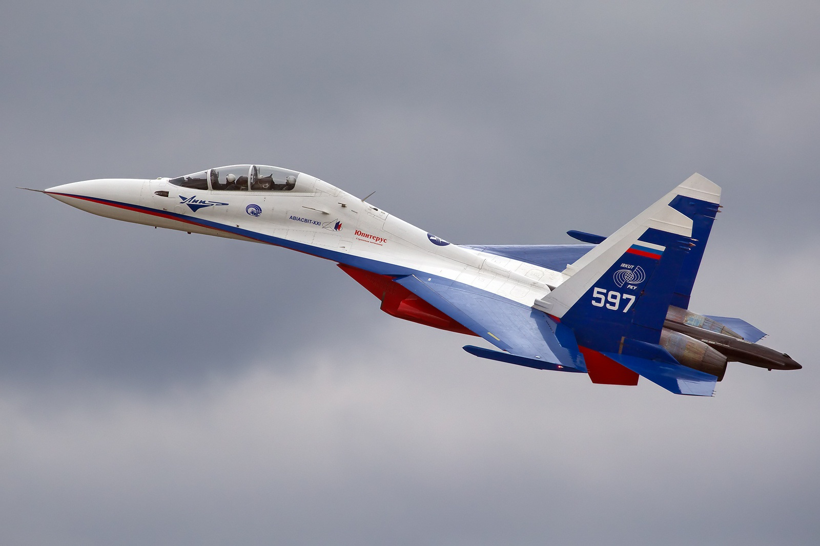 Sukhoi Su-30LL Kiev - Gostomel (Antonov) (UKKM) Ukraine, October 1, 2010 597 (cn 79371010102) Spectacular performance of Anatoly Kvochur